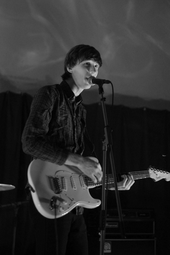 Marie Antoinette / Berlin / 17th November 2010